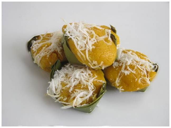 ขนมตาล